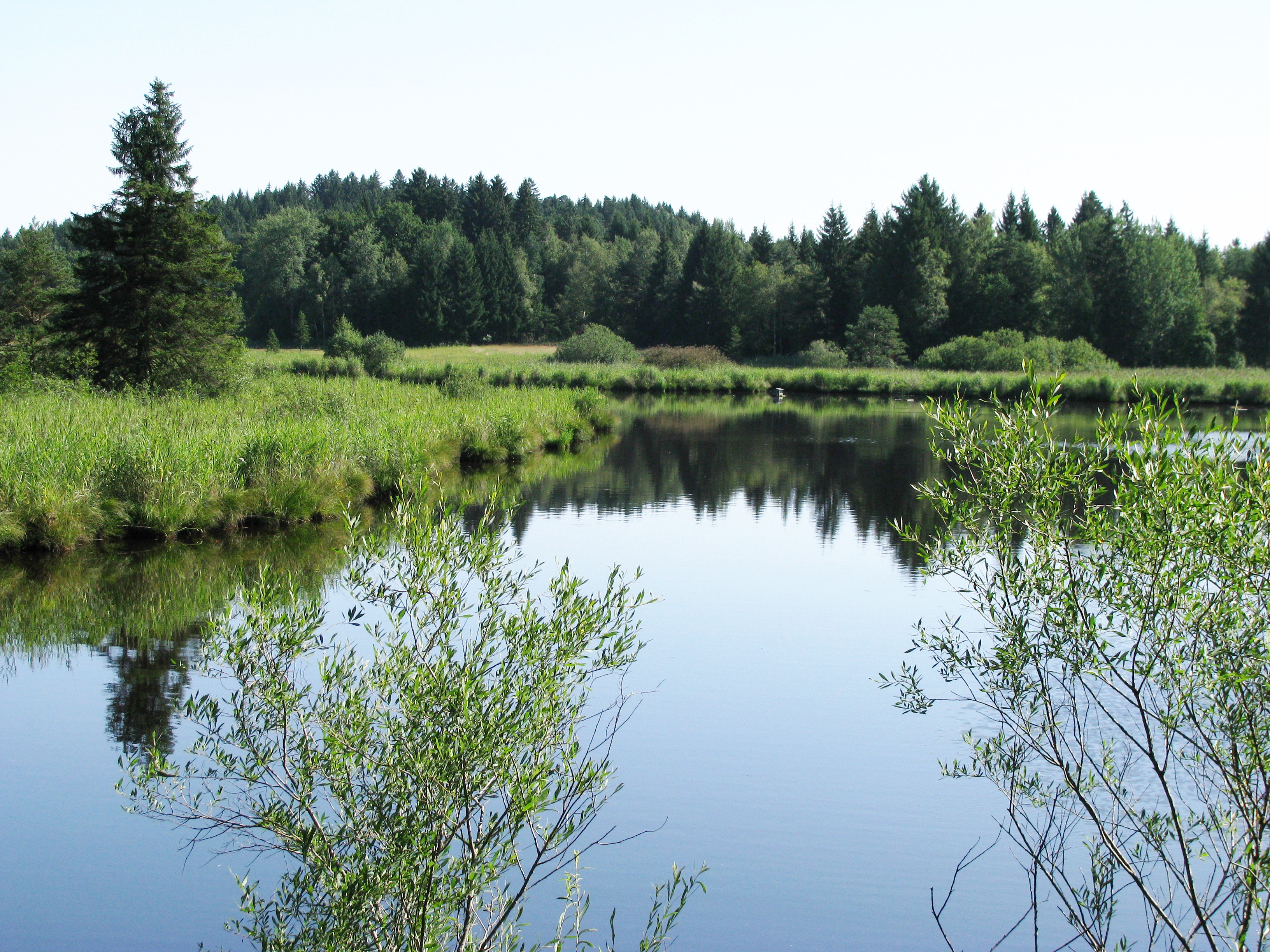 Mooshamer Weiher nach Nordosten gesehen.